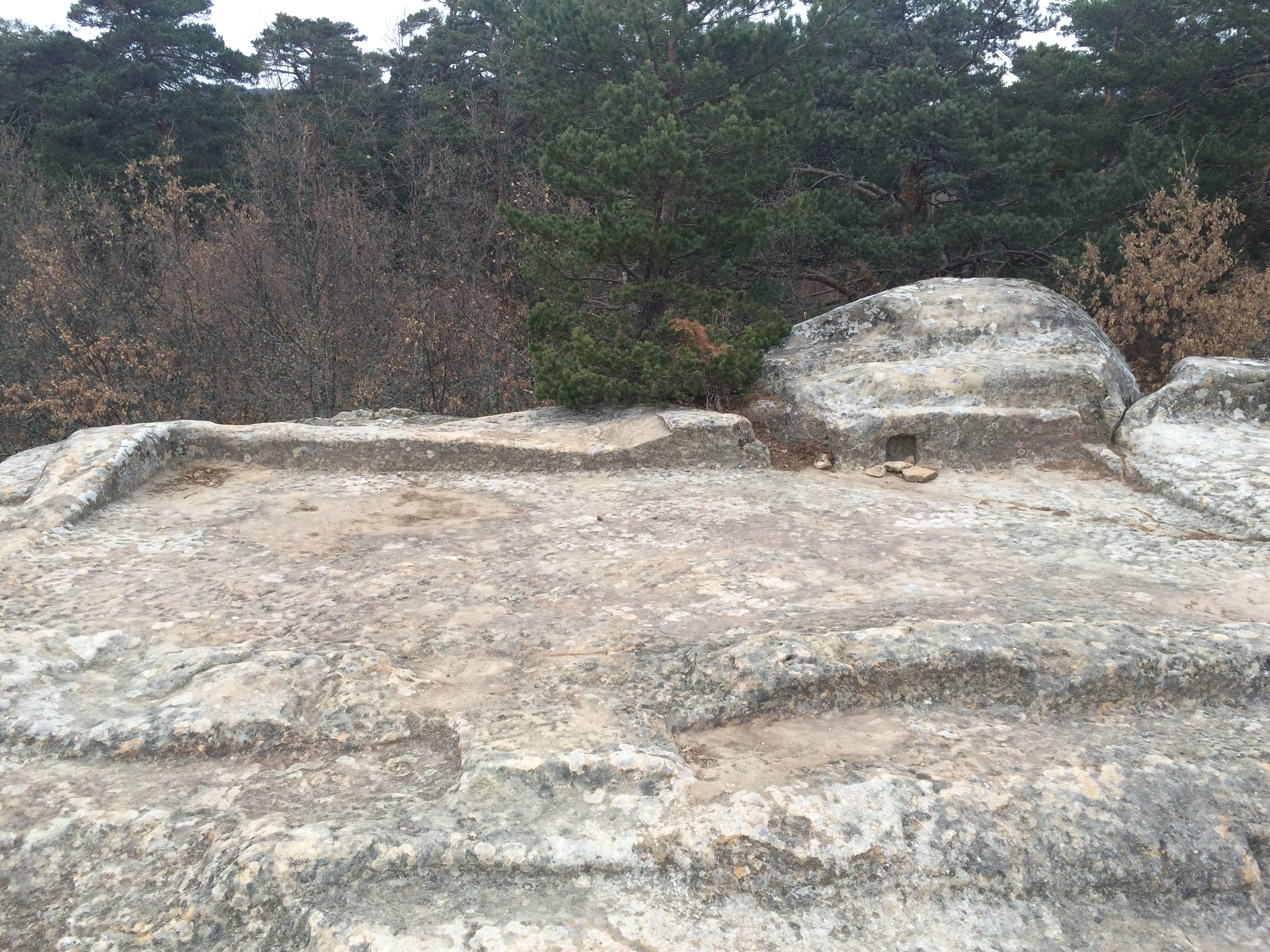 Ubicación de la antigua iglesia